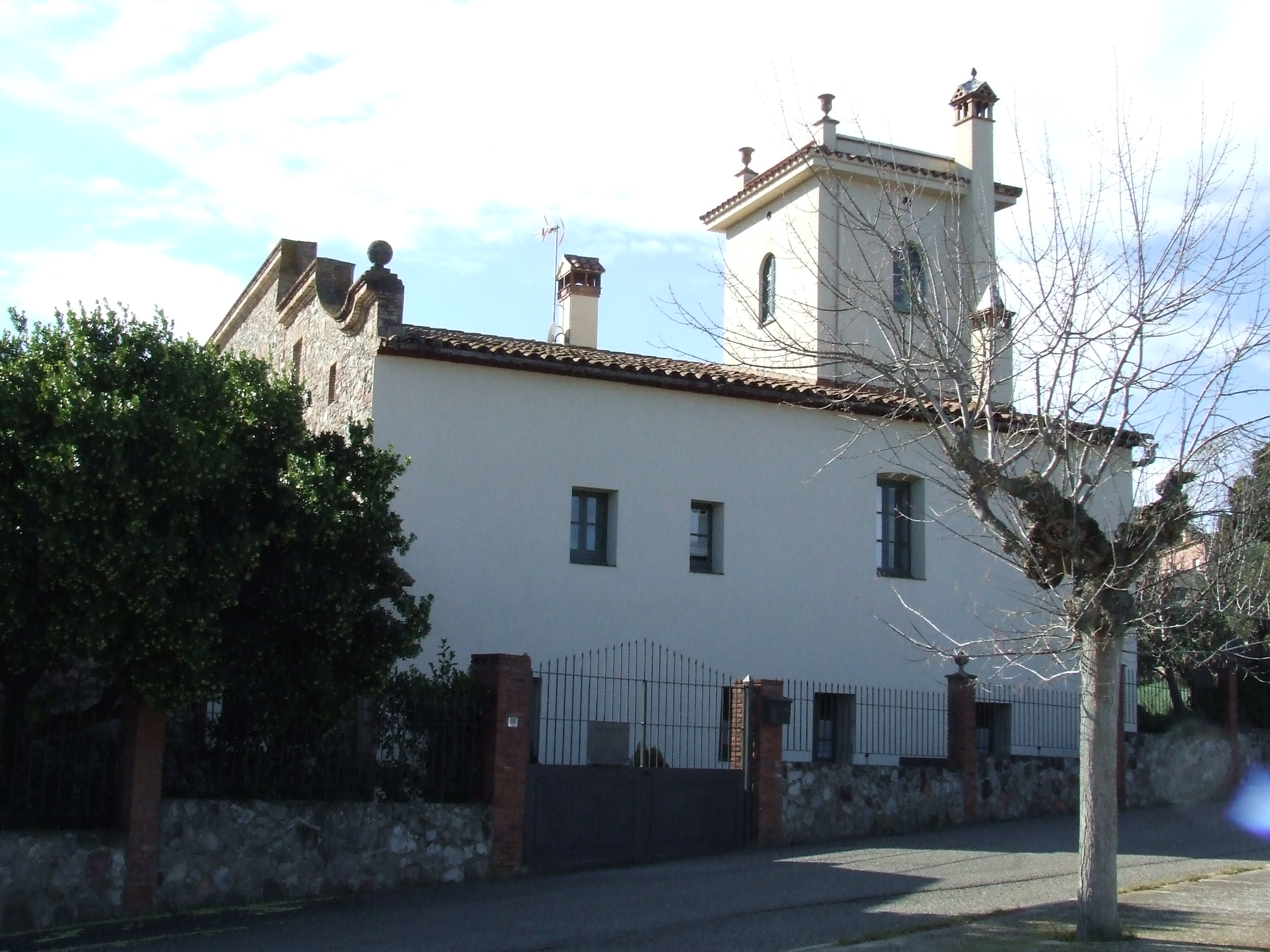 Can Carreres (Bigues, Bigues i Riells, Vallès Oriental)